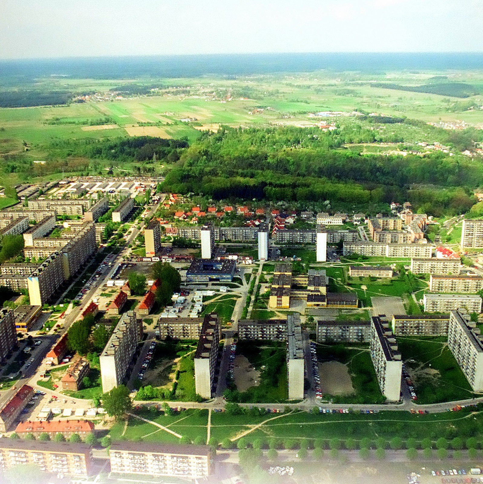 Gorzów Wlkp. Os. Staszica z lotu ptaka - 2002 r.